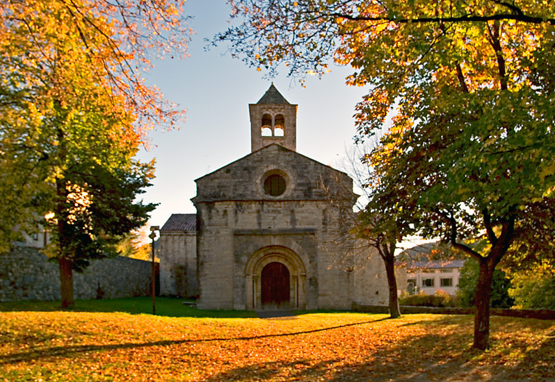 Monasterio de Sant Pere de Camprodon